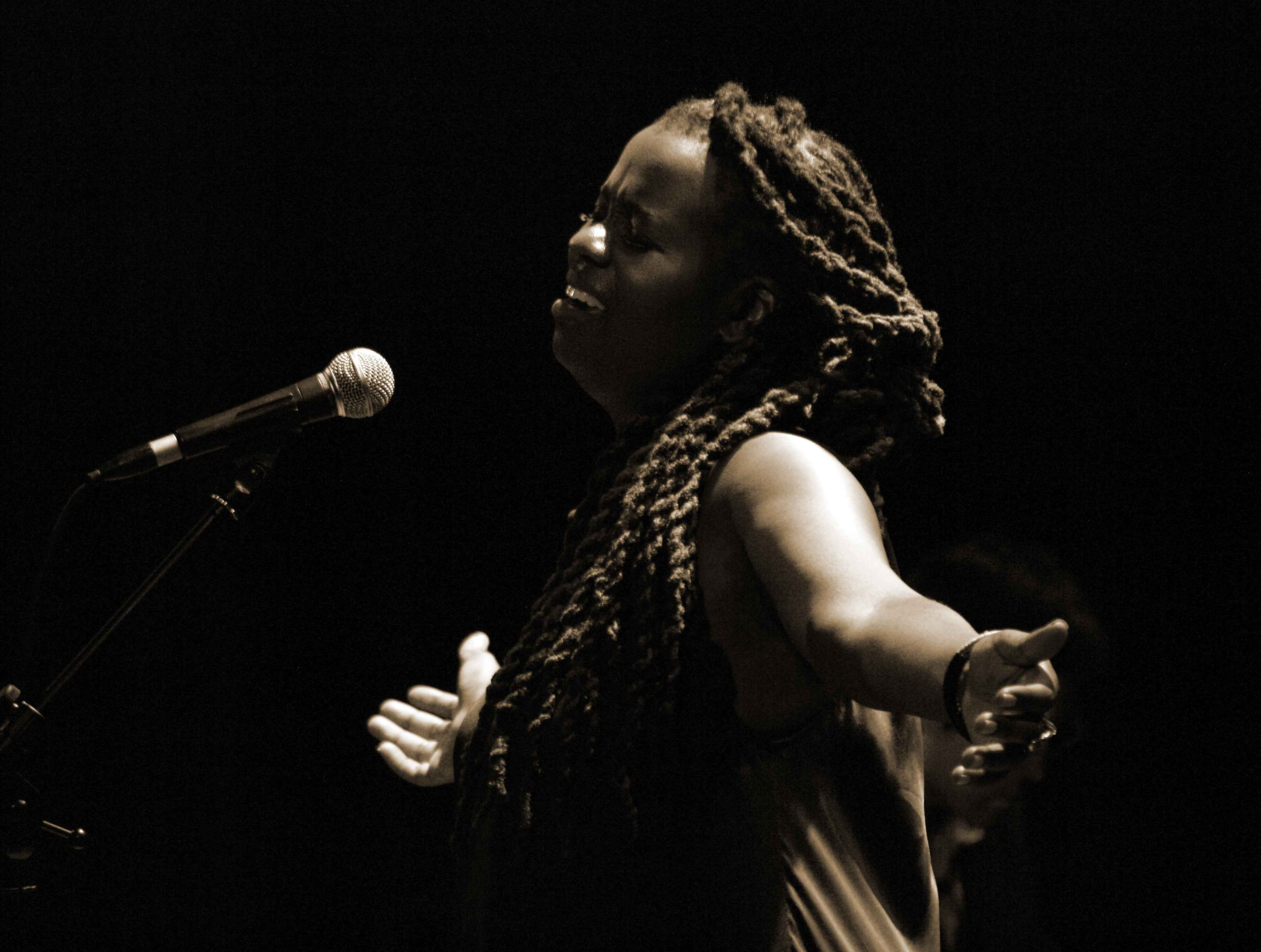 SOMI, концерт в рамках фестиваля "Акваджаз" в "Зимнем театре", 05.08.2016